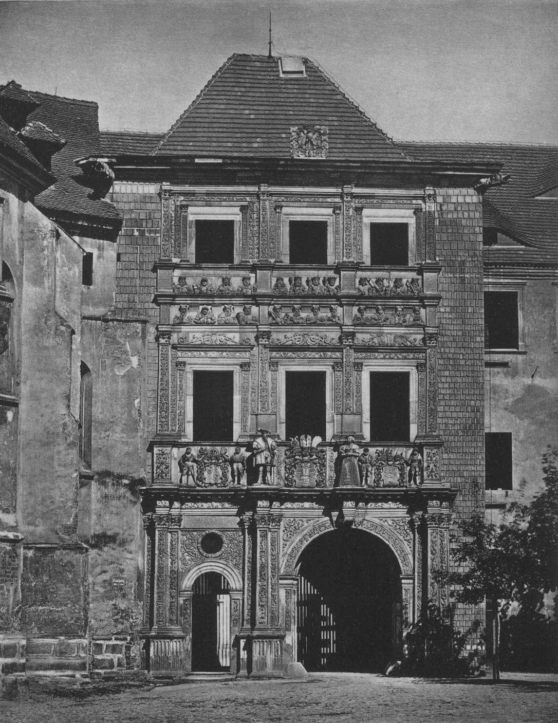 Wejście do Zamku Piastów w Brzegu.